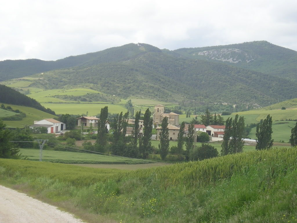 Nafarroako Eguesibarko Uztarrotz kontzejuaren ikuspegia.